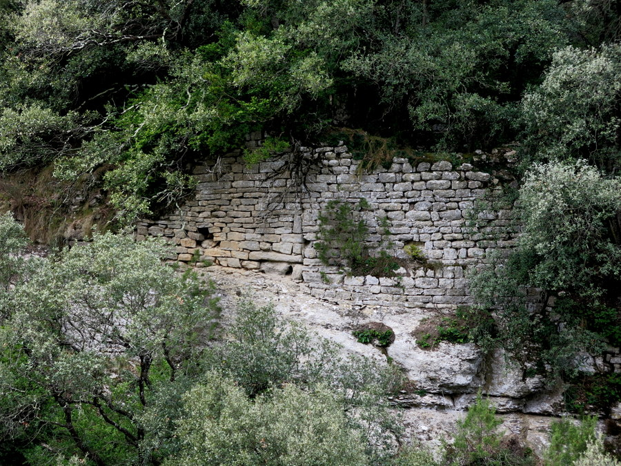 castell de Gornil - Osona / Catalunya